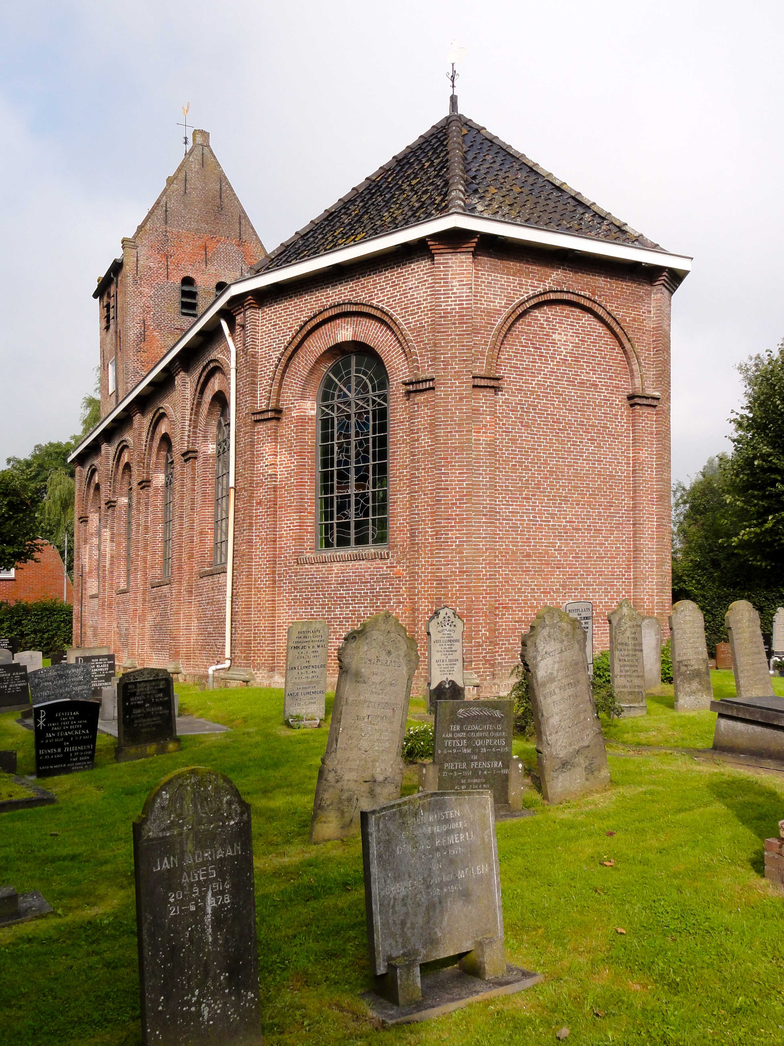 Sint-Lebuïnuskerk van Molkwerum